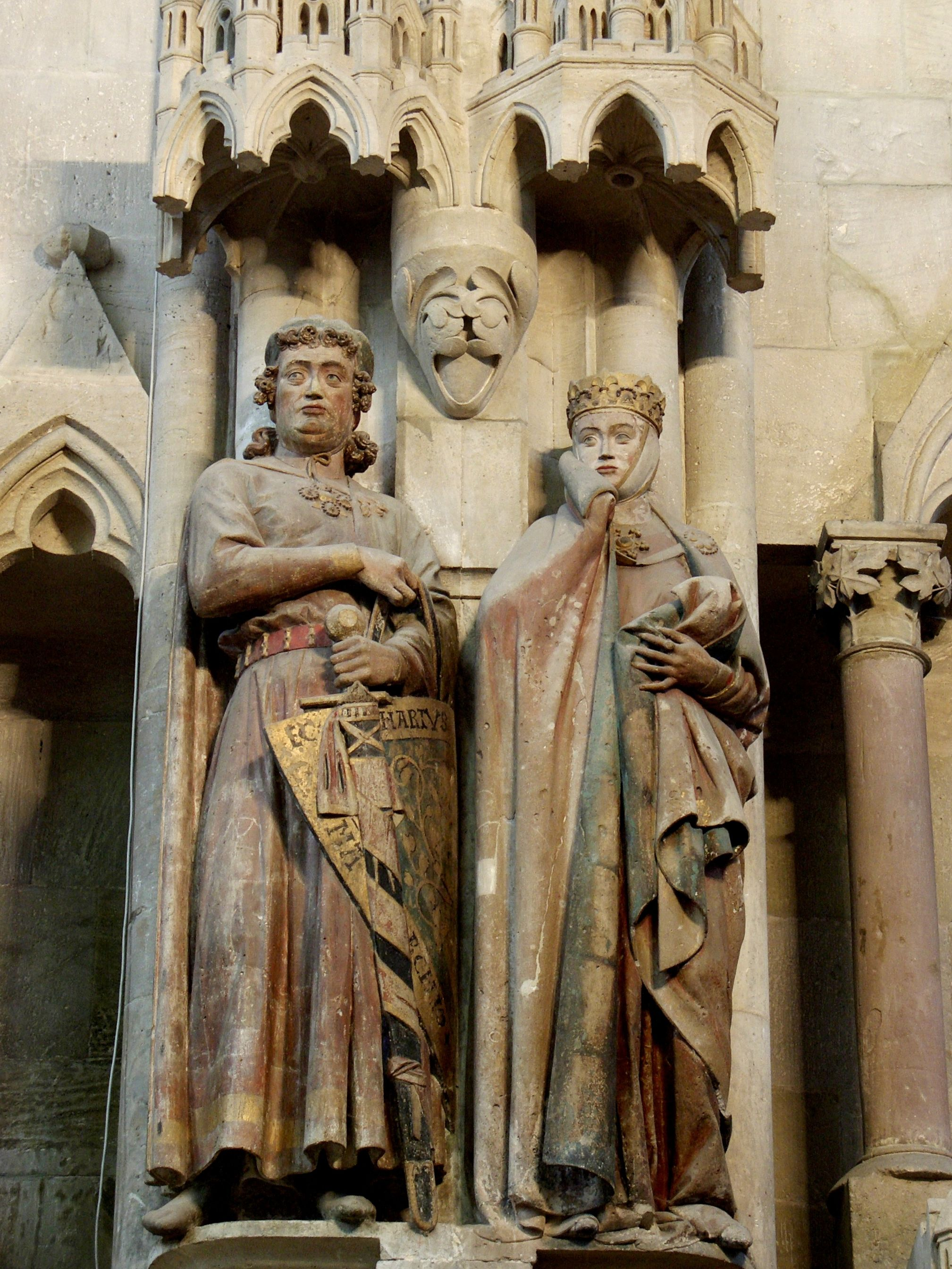 Estàtues fundadors de Naumburg